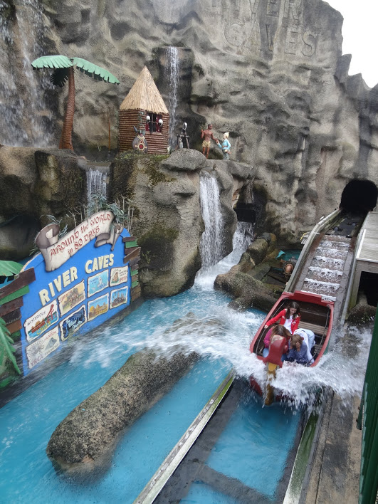 River Caves à Pleasure Beach, Blackpool